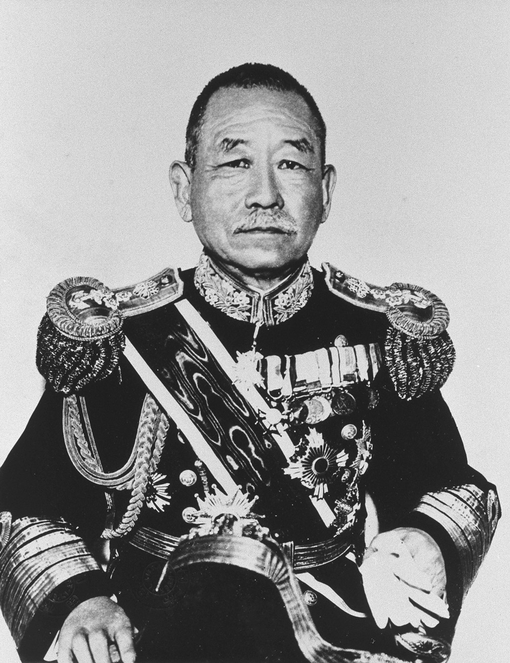 Portrait of Okada Keisuke (岡田啓介, 1868 – 1952)